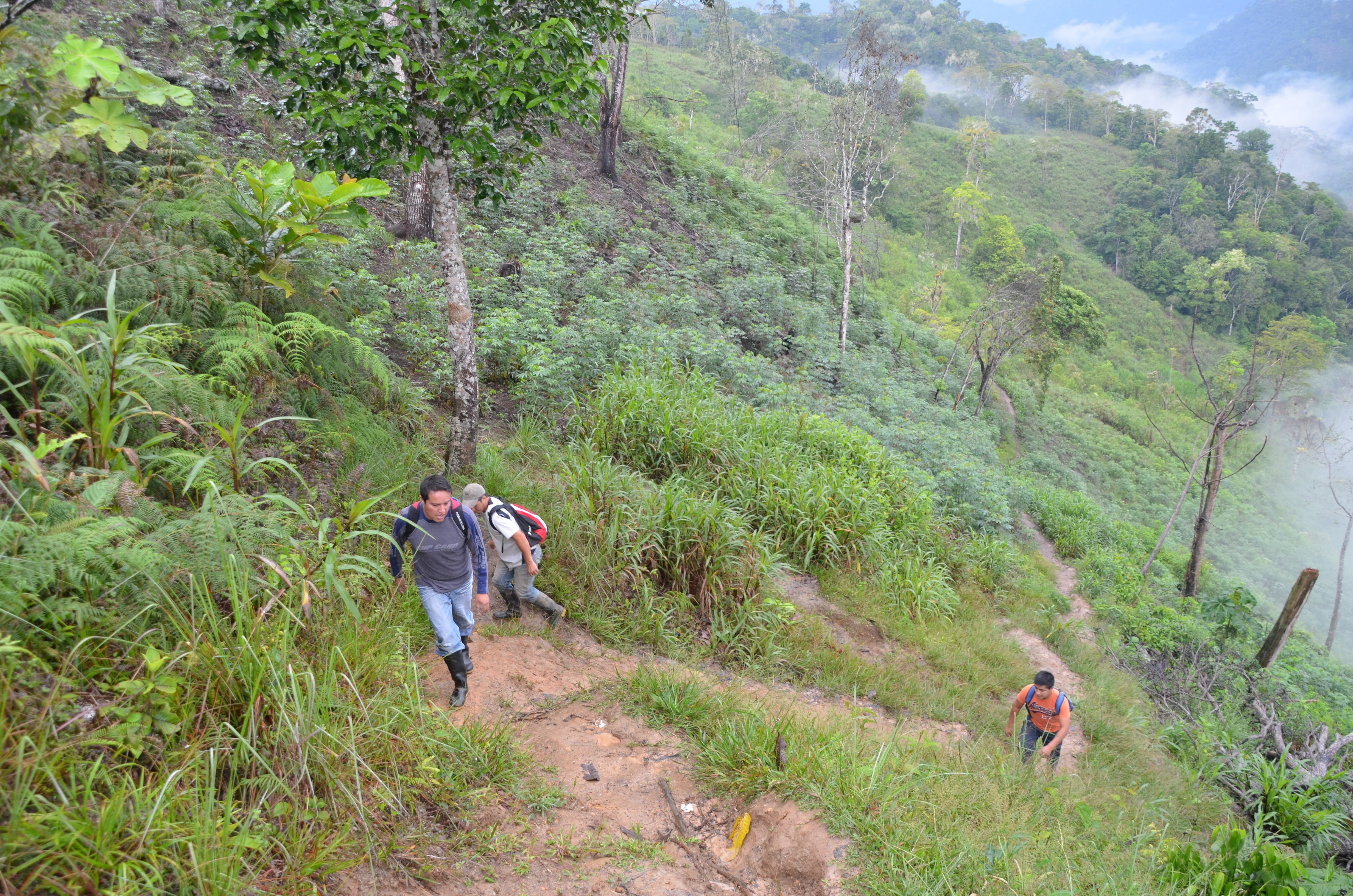 Mirador del río Upano en el camino a Cascadas del valle misterioso, Huambi, Sucua, Ecuador